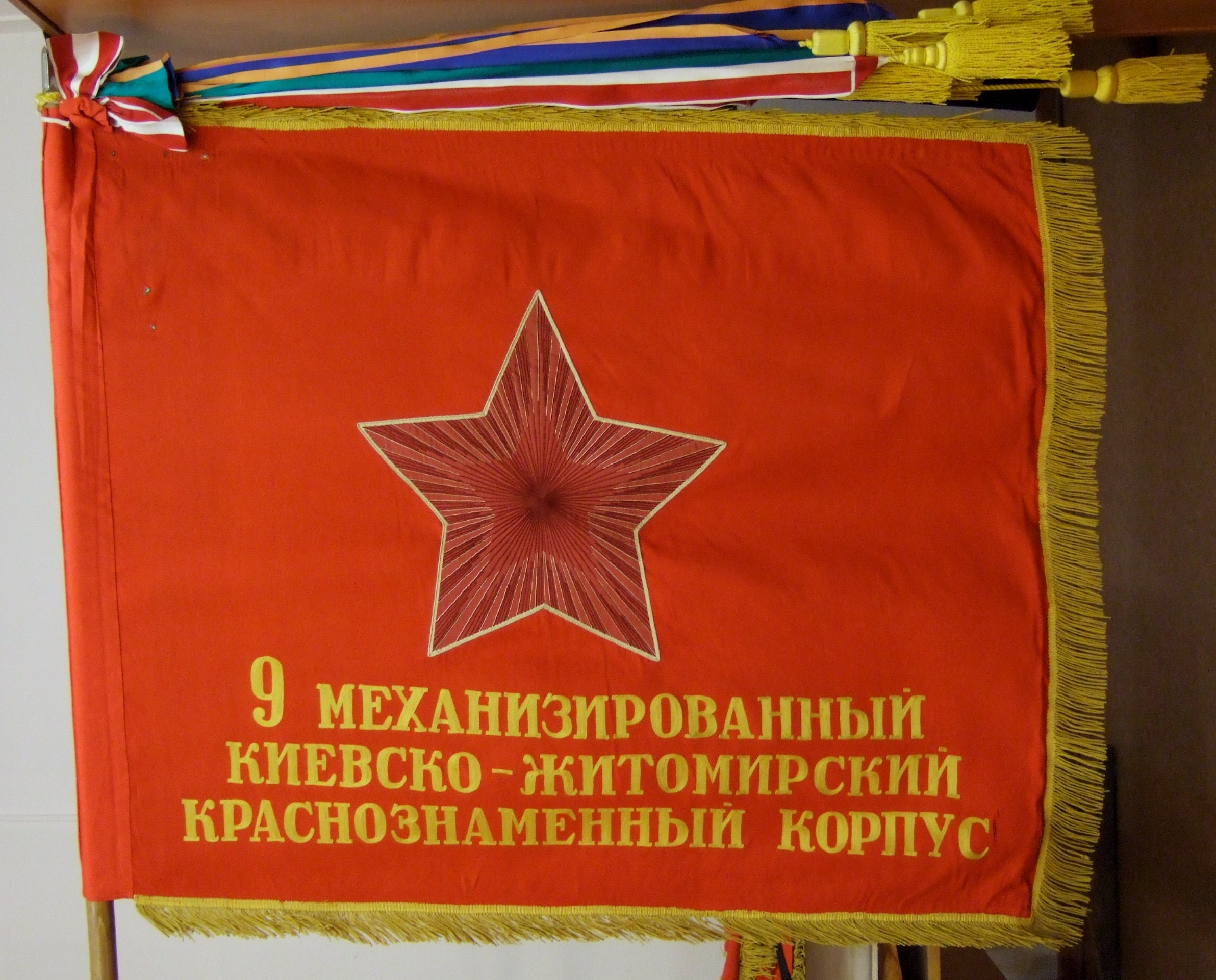 Боевое Знамя 9 механизированного Корпуса времён Великой Отечественной Войны, фото сделано в Знамённом Фонде Центрального музея ВС